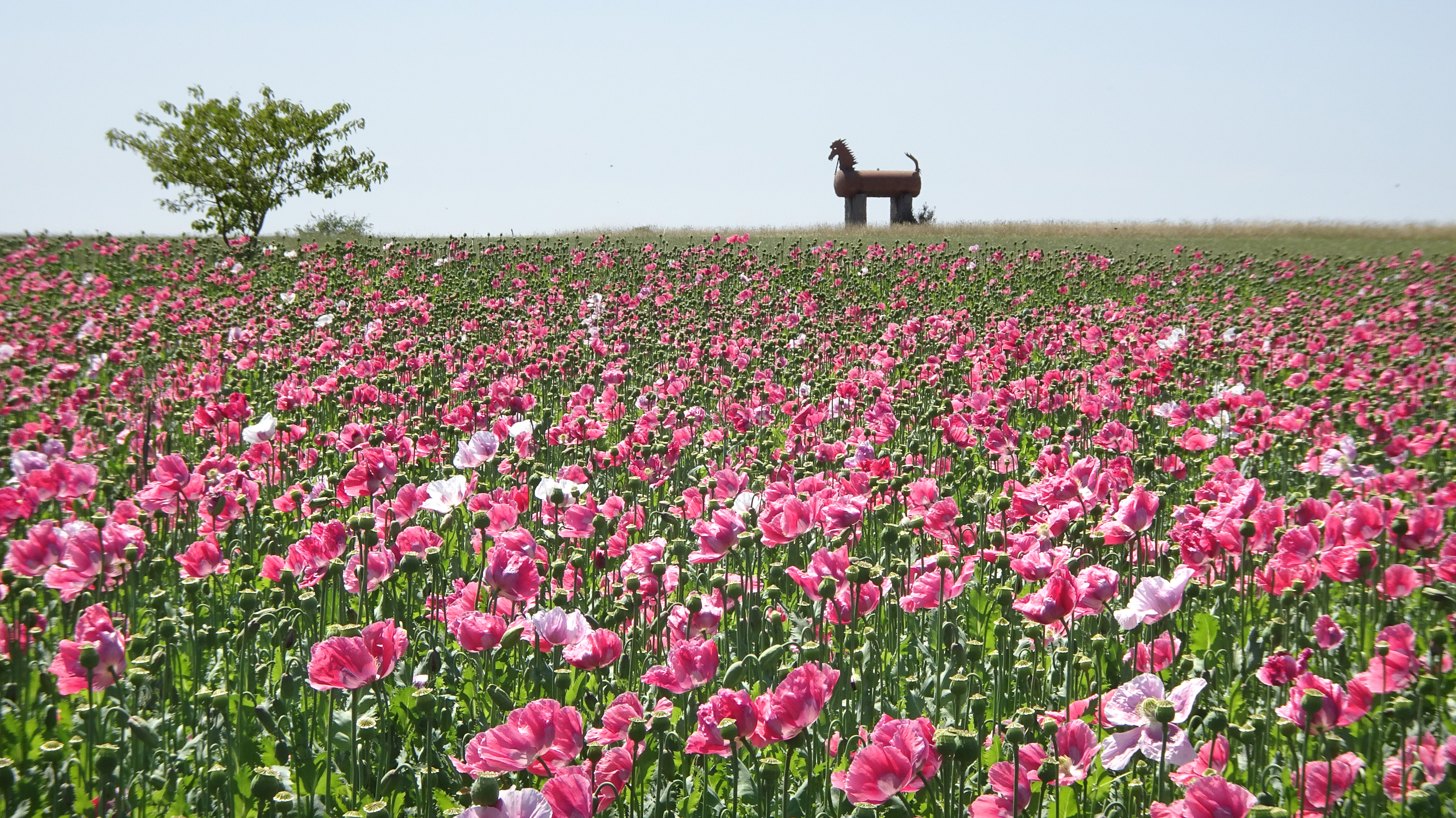 Seit 2017 blühen in Grandenborn auf einer Fläche von rund fünf Hektar Mohnfelder. Das „Trojanische Pferd“ ist ein früherer Hochbehälter der der Versorgung mit Wasser für das Weidevieh diente. Grandenborn ist ein Ortsteil der Gemeinde Ringgau im nordhessischen Werra-Meißner-Kreis.